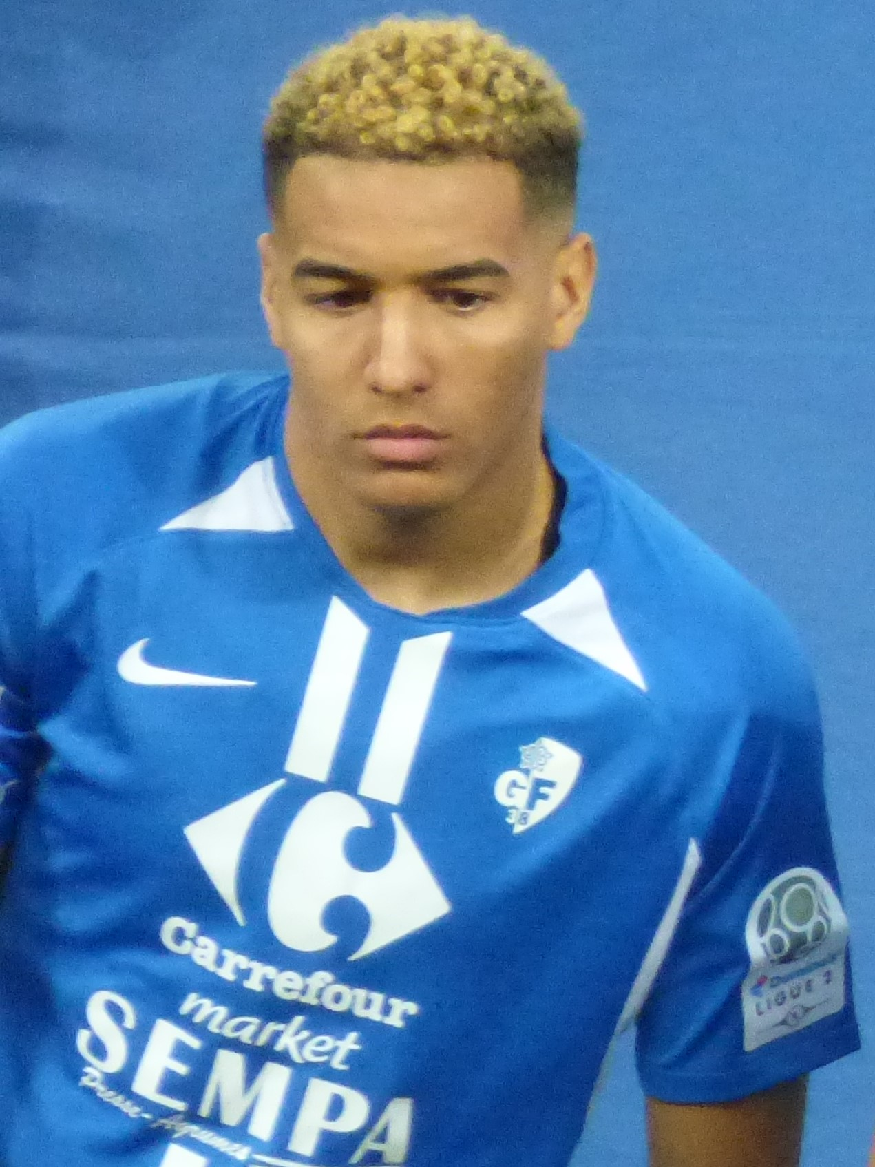 Charles Pickel lors du match RC Lens / Grenoble Foot 38, le 10 février 2020, comptant pour la vingt-quatrième journée du championnat de France de football de Ligue 2 2019-2020, au Stade Bollaert-Delelis.